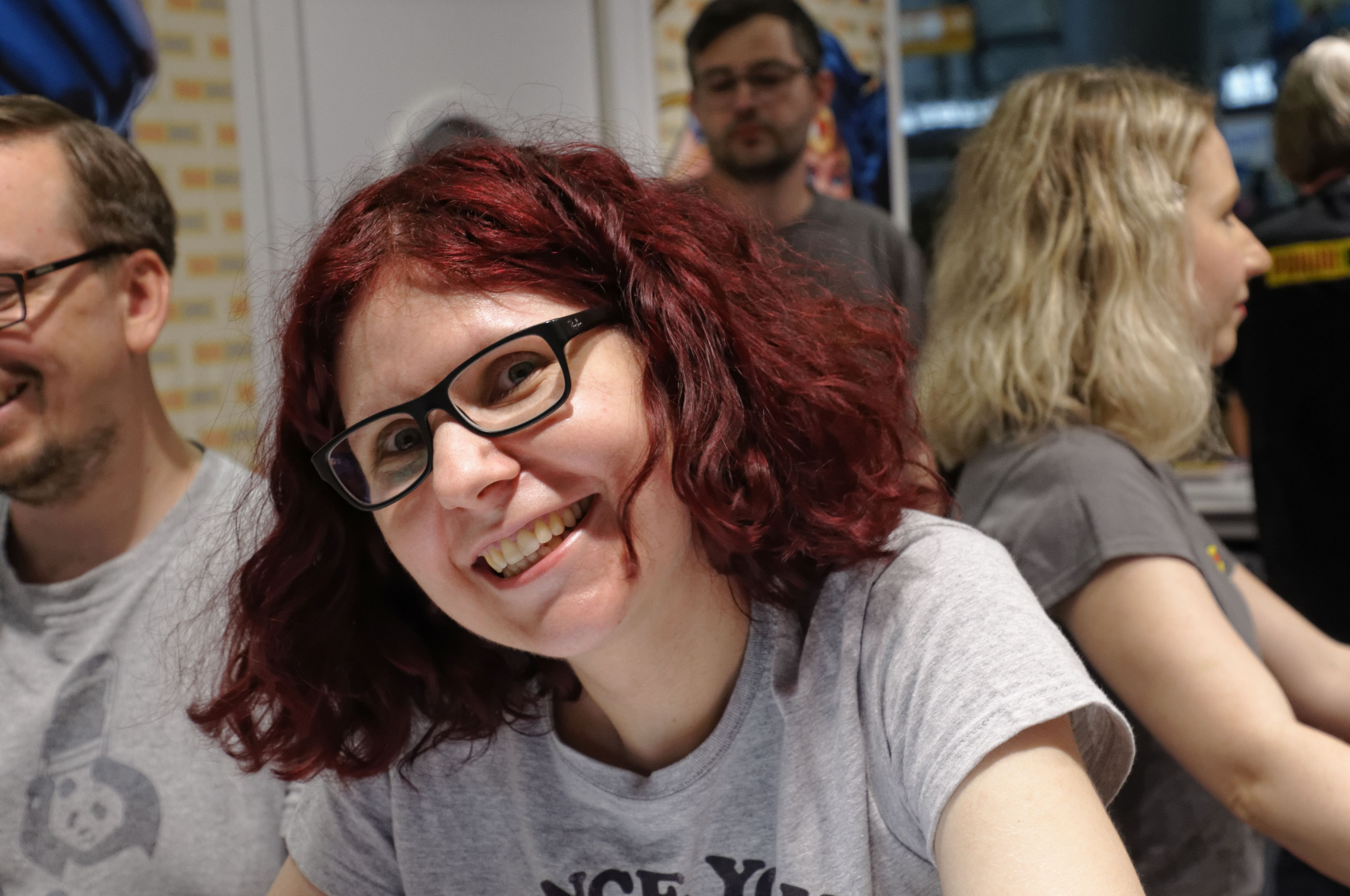 Bilder von der Comic Con Germany 2019 in Stuttgart